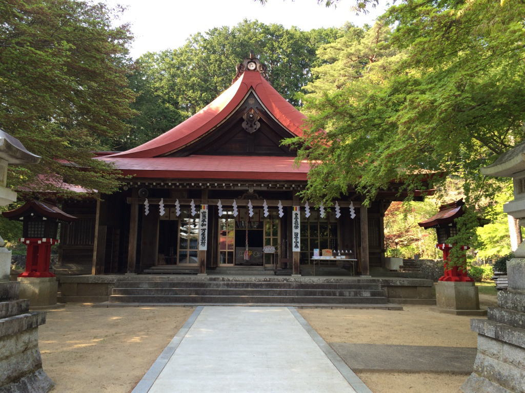 霊山神社拝殿